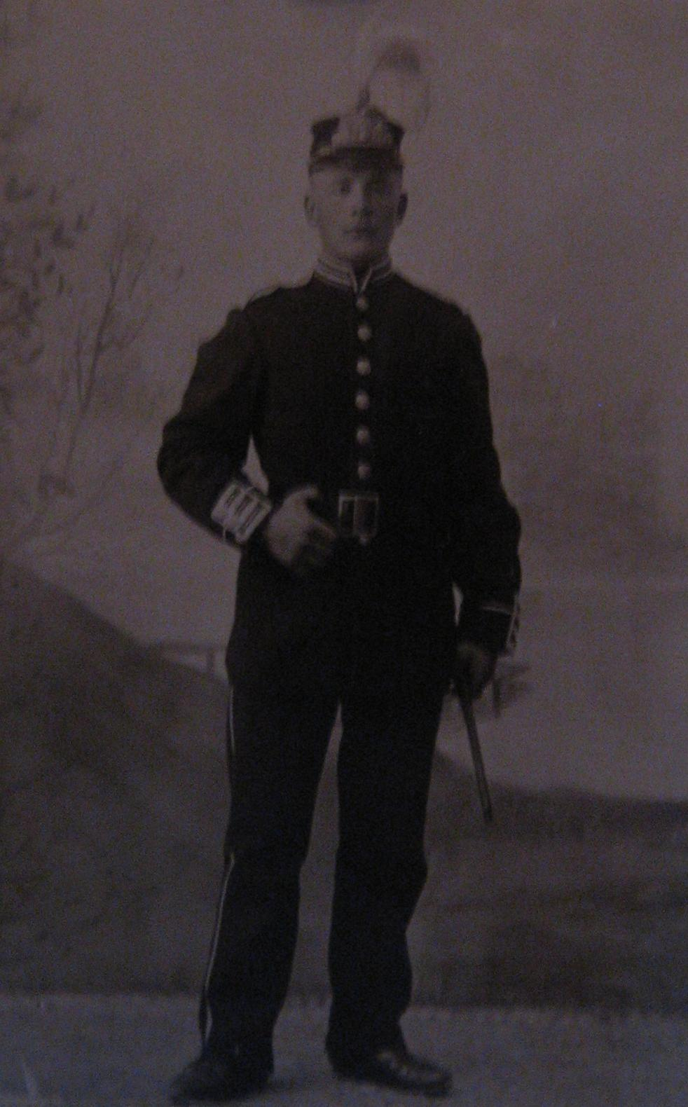 Menig grenadjär vid livregementet till fot (Karl Erfelt).